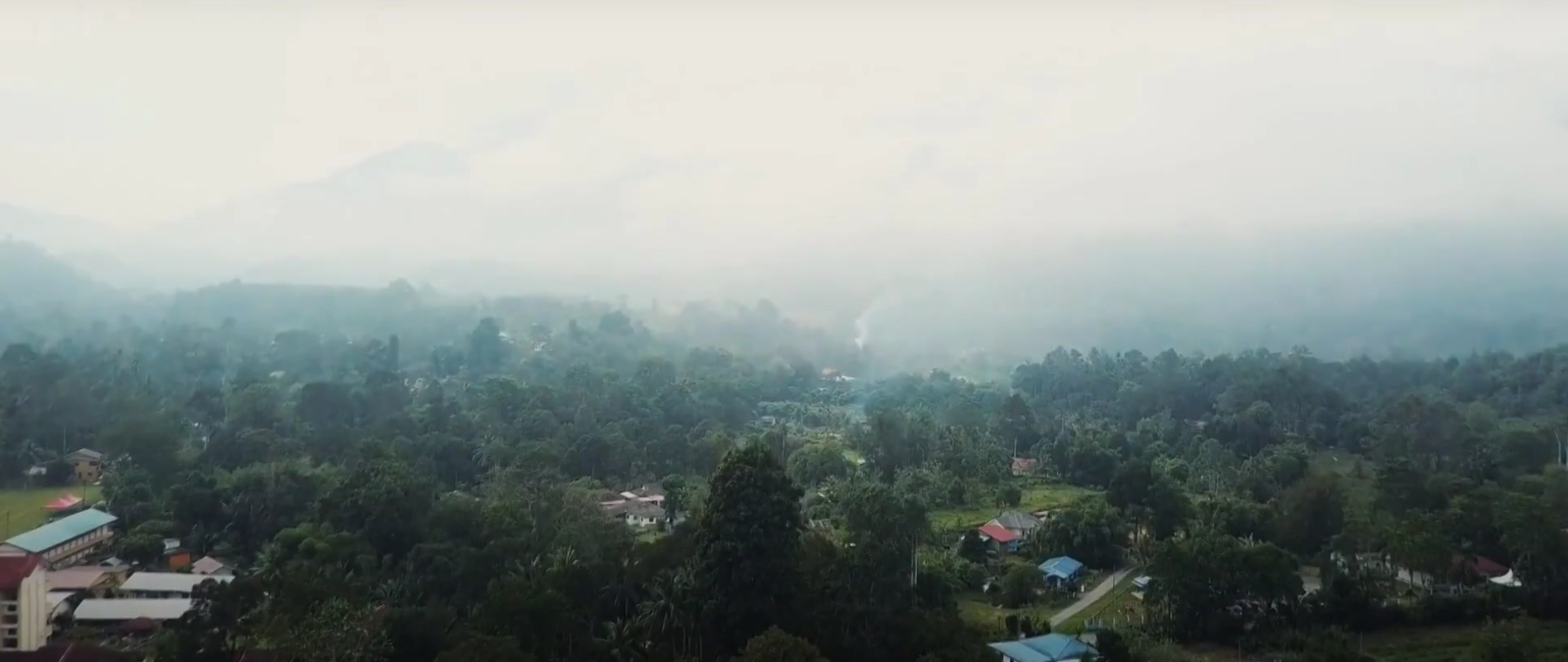 Janda Baik viewed from drone